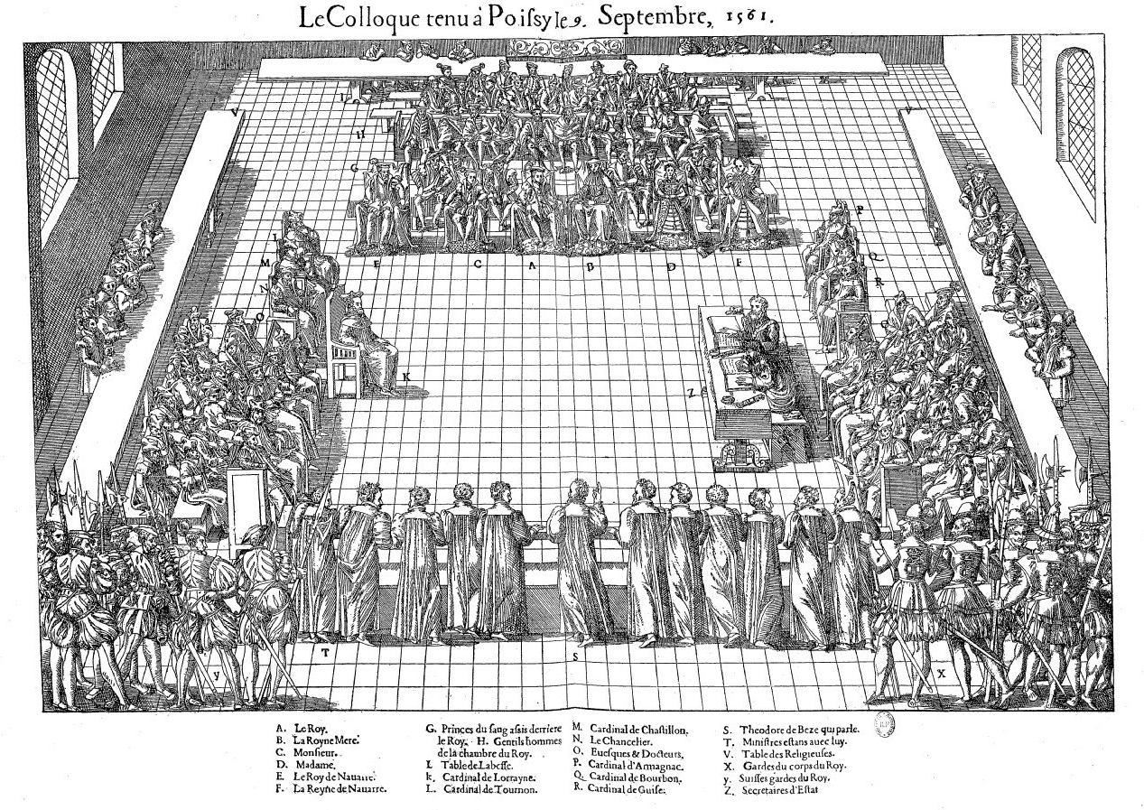 Le colloque de Poissy, gravure de Tortorel et Perrissin.